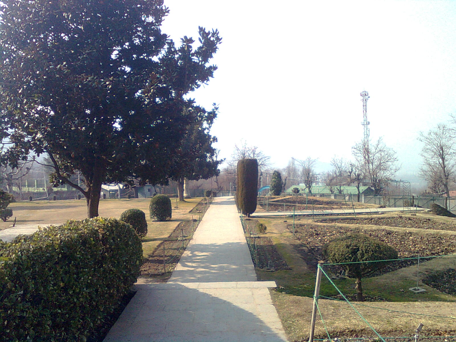 Cheshme Shahi Garden Srinagar